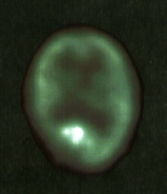 Hirn-PET (F18-FDG) mit Hirnmetastase rechts okzipital (vermehrte Glucose-Utilisation) und begleitendem Hirnödem (verminderte Glucose-Utilisation). Siehe auch zugehörige MRT: Image:HirnmetastaseMR001.jpg.